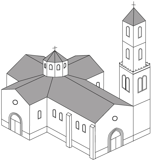 Iglesia de San Juan (Tudela), desaparecida; reconstrucción del edificio para principios del siglo XIX.